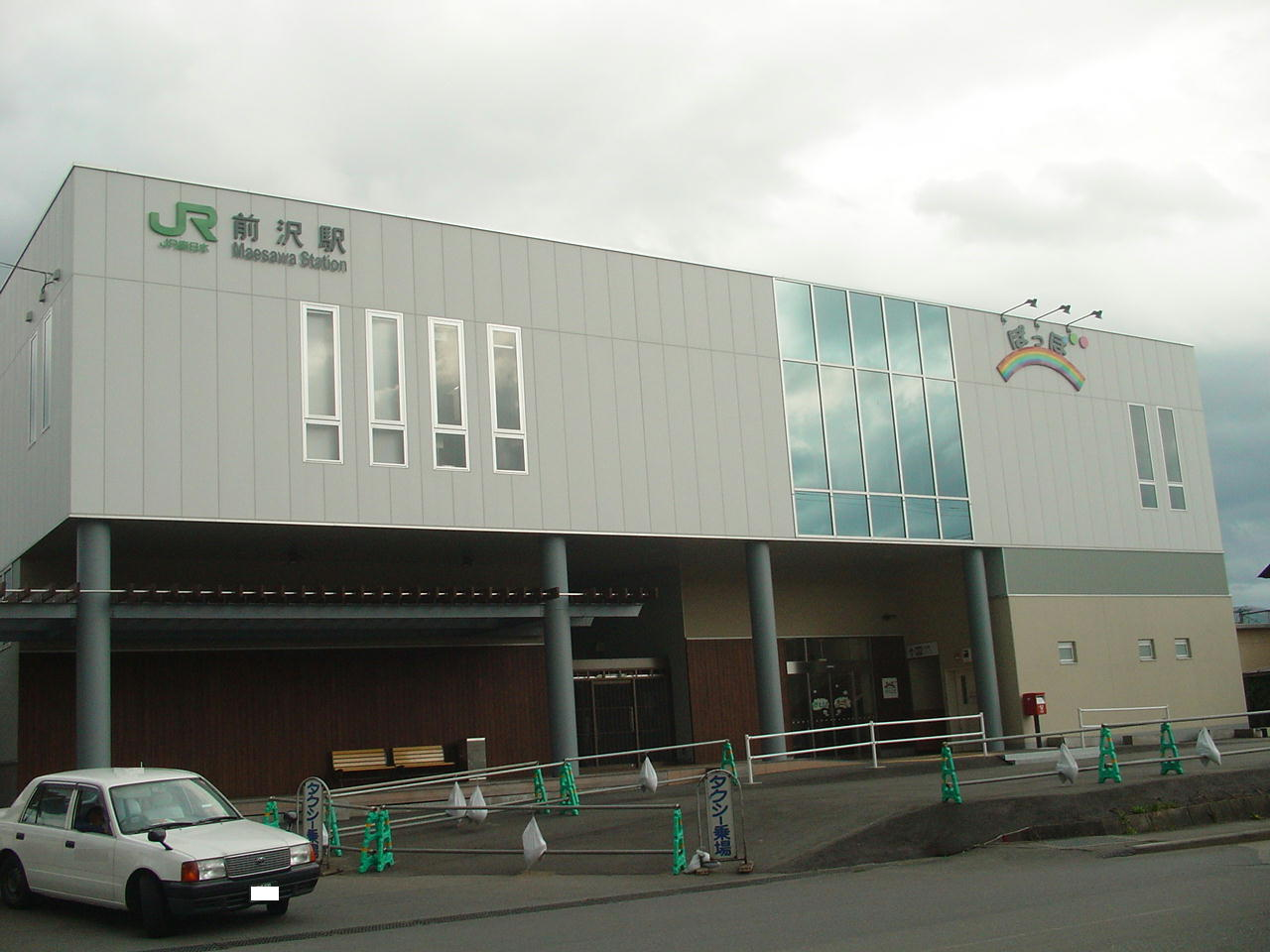 （前沢駅）